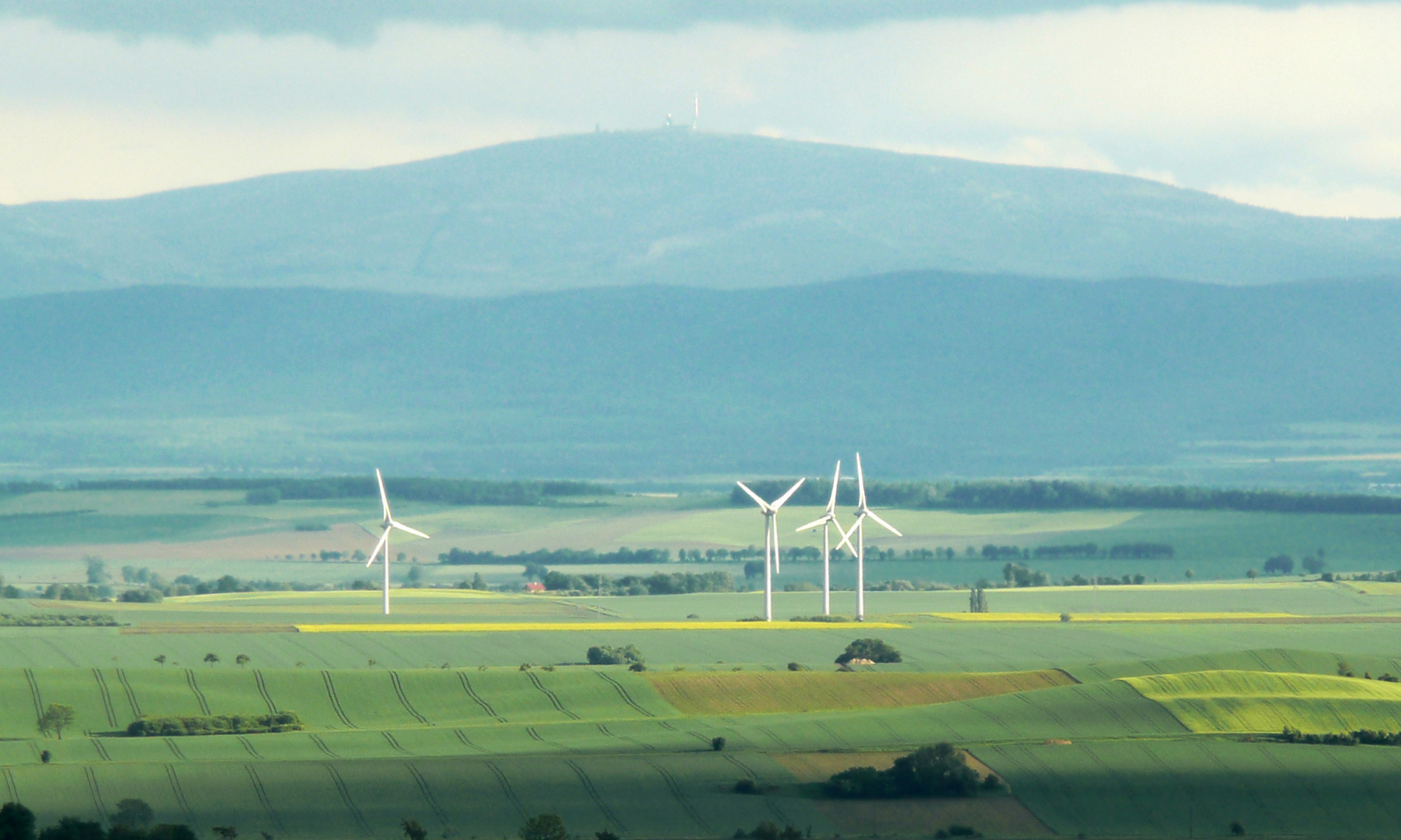 Brocken mit Harzvorland, vom Bismarckturm auf der Asse oberhalb von Wittmar aufgenommen, 40 km Luftlinie zum Brocken